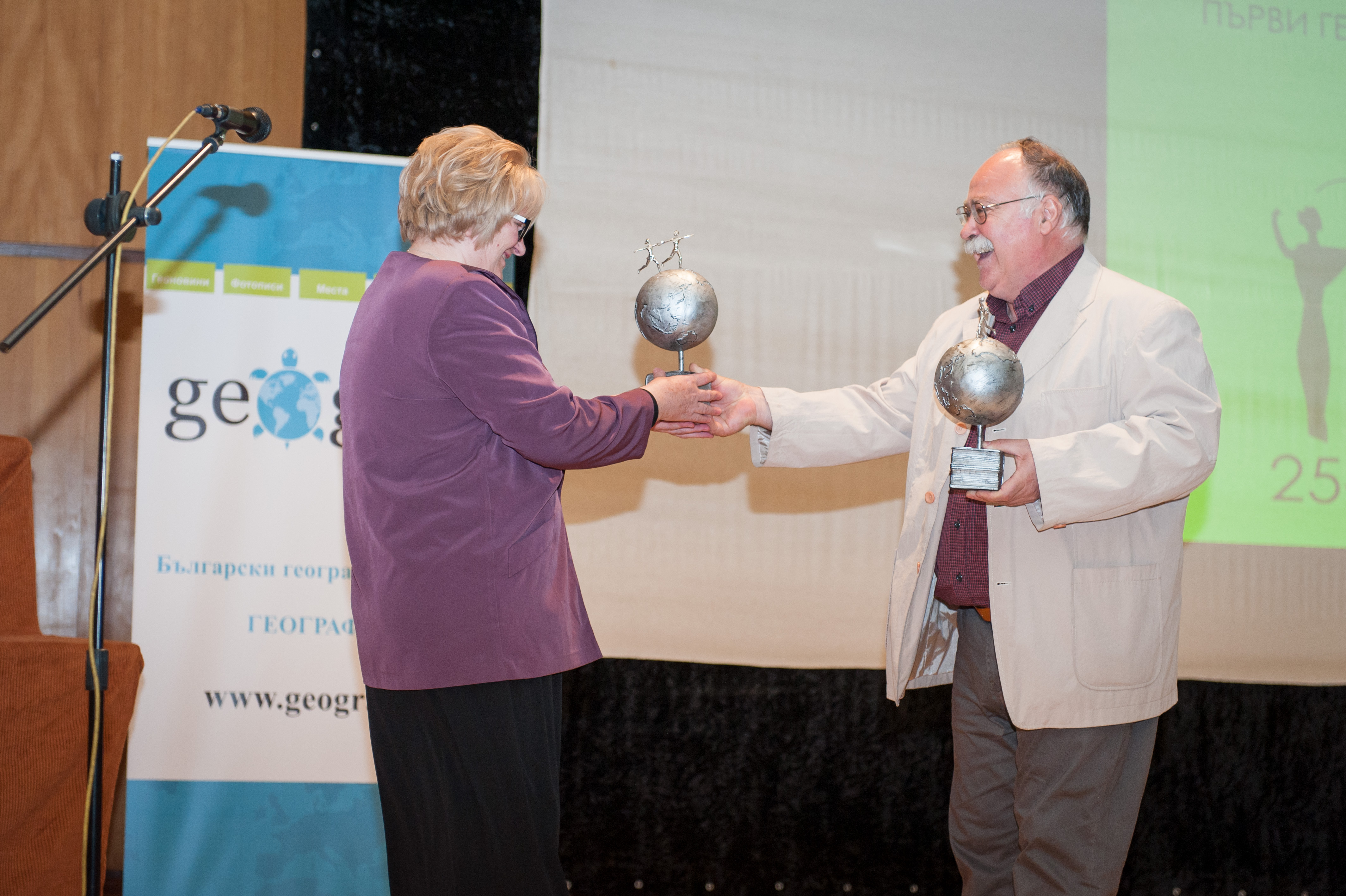 Председателят на Организационния комитет проф. Румен Пенин връчва специална награда на учителката по география от град Ямбол г-жа Радка Цингова